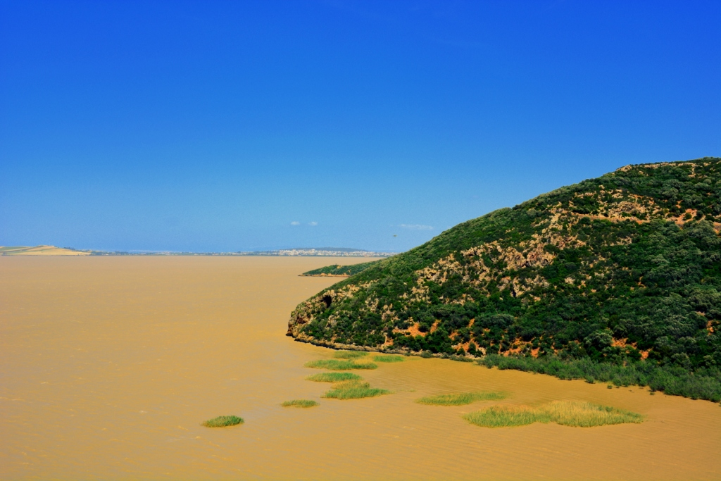 Vue sur le lac